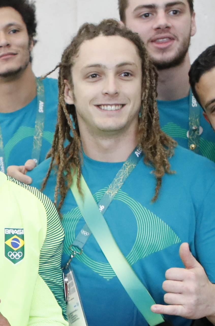 Rio de Janeiro - O campeão mundial de surfe Gabriel Medina visita atletas brasileiros de handebol, na Vila Olímpica dos Jogos Rio 2016 (Fernando Frazão/Agência Brasil)